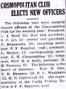 Compte-rendu des élections au Cosmopolitan Club de l'université Cornell en mai 1921.